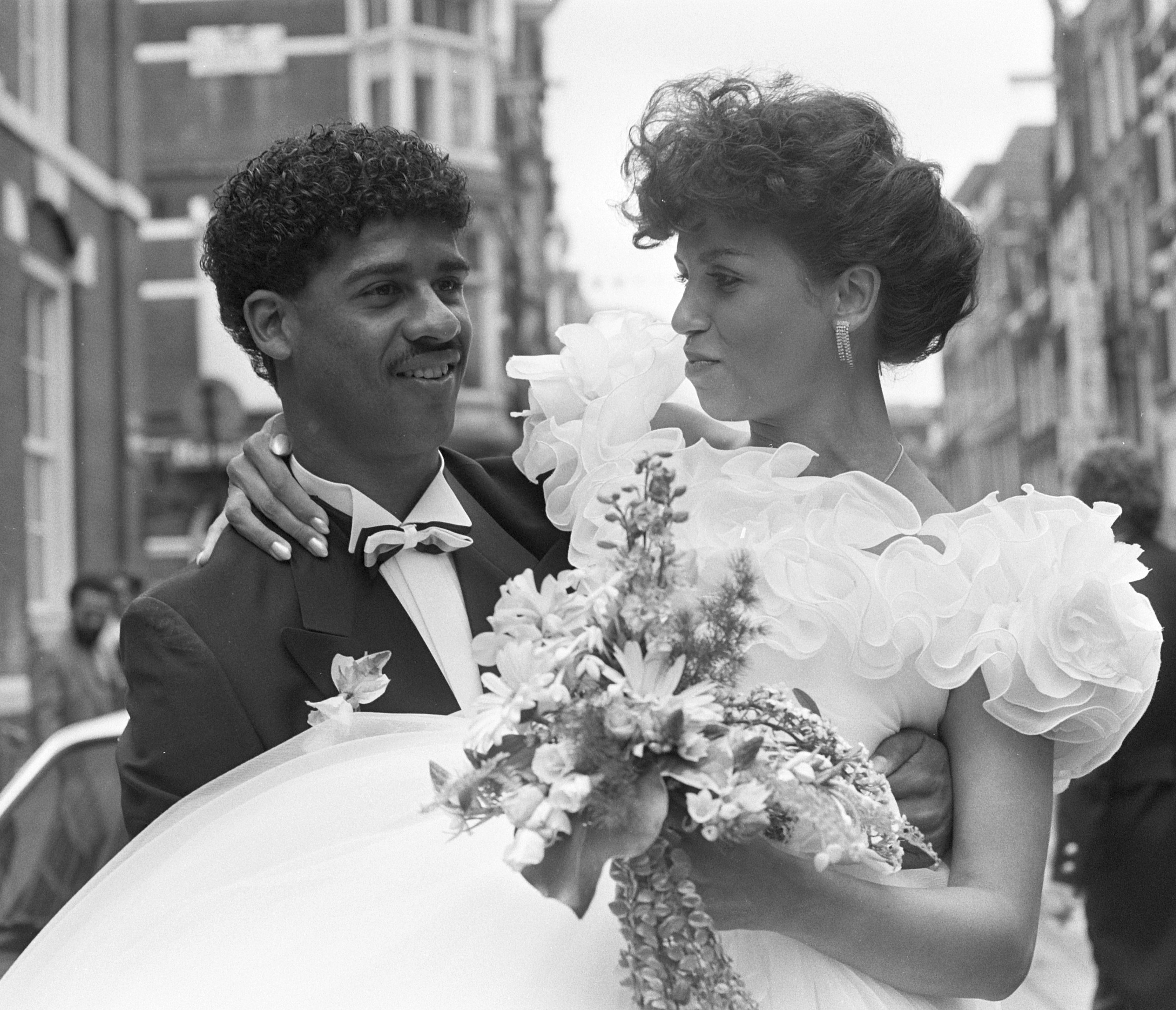 Voetballer Frank Rijkaard trouwt met Carmen Sandries